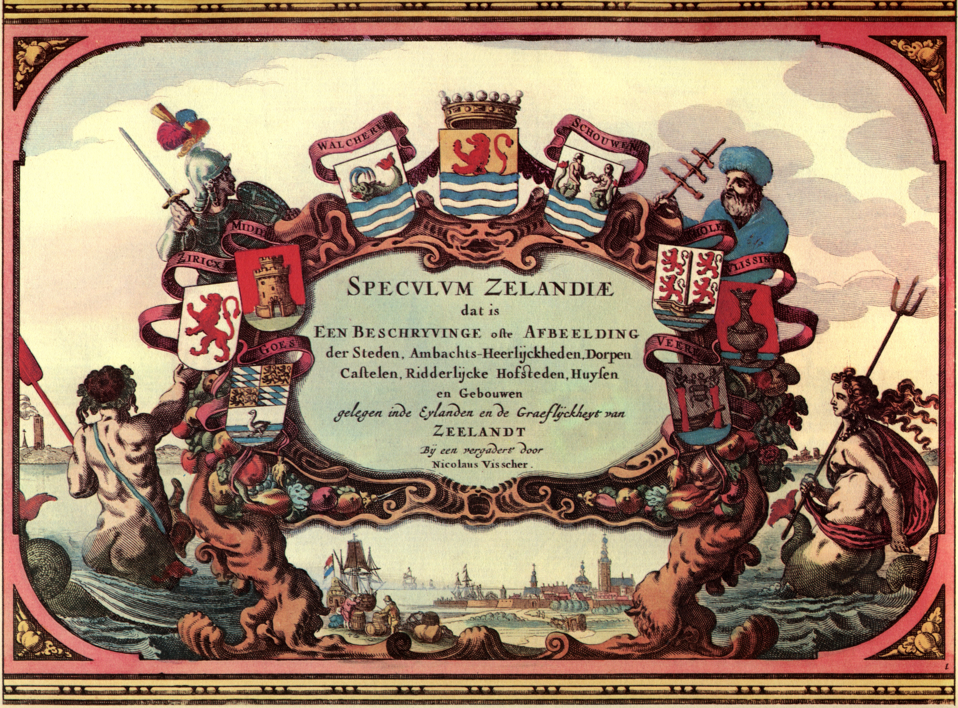 Titelpagina Speculum Zelandiæ Gravure